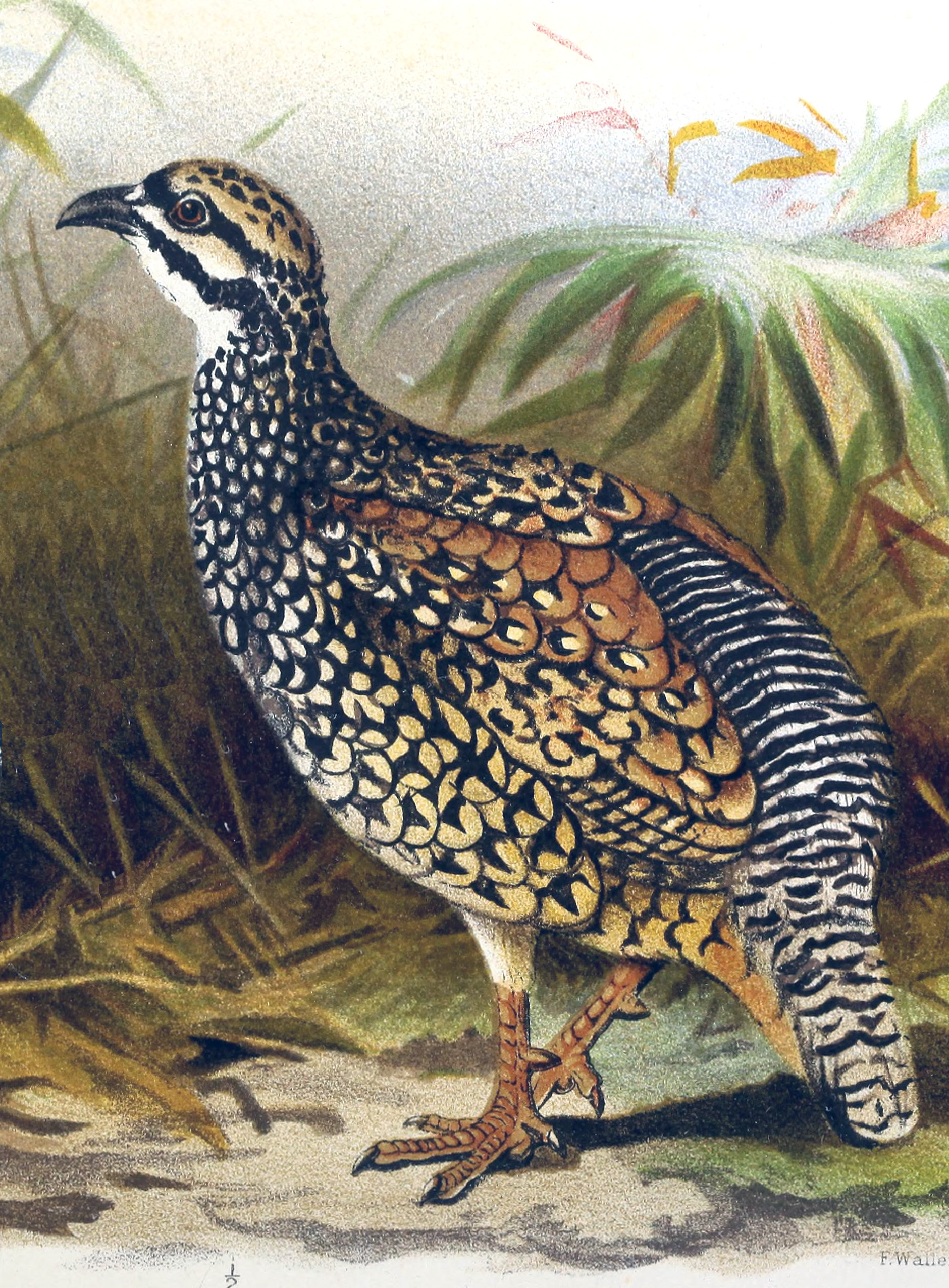 Francolinus pintadeanus